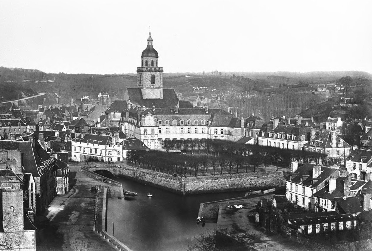 L'Abbaye Sainte-Croix de Quimperlé avant son effondrement en 1862.